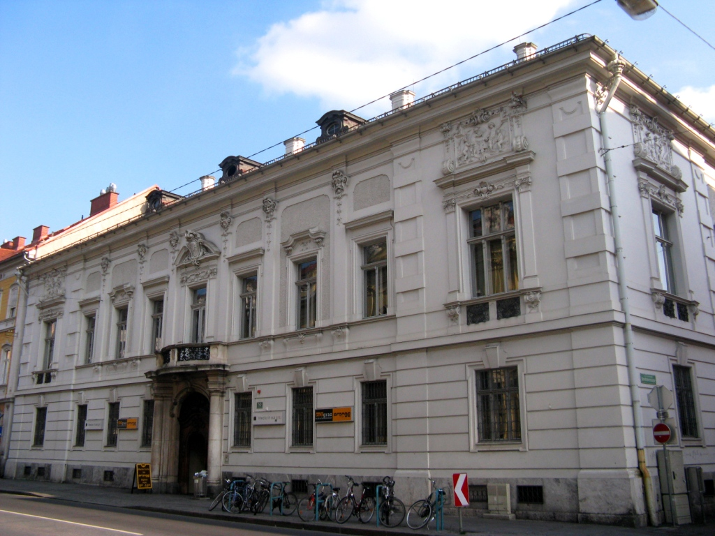 Ehem. Stadtpalais Mayr-Melnhof